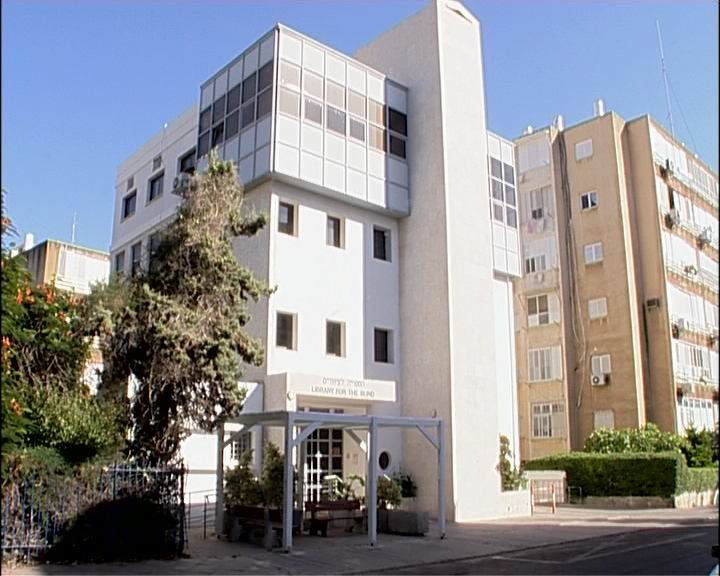 צילם:אבי ידלין